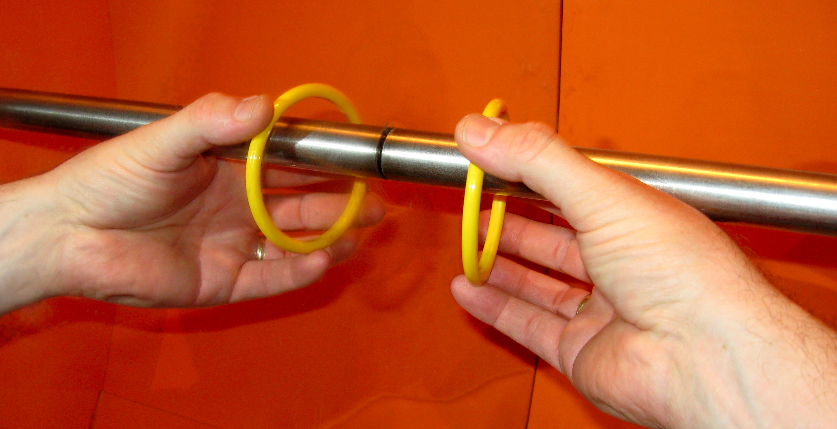 "Spiegeltherapie" in "Dein Gehirn". Die "linke Hand" wurde mit der rechten Hand fotografiert.